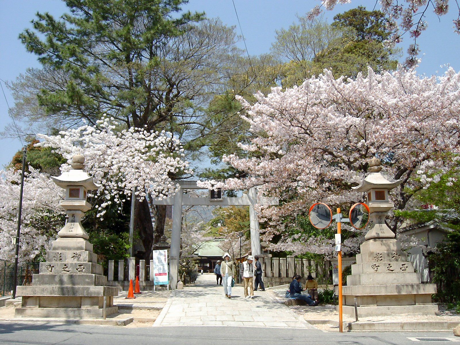 at Mikage, KOBE